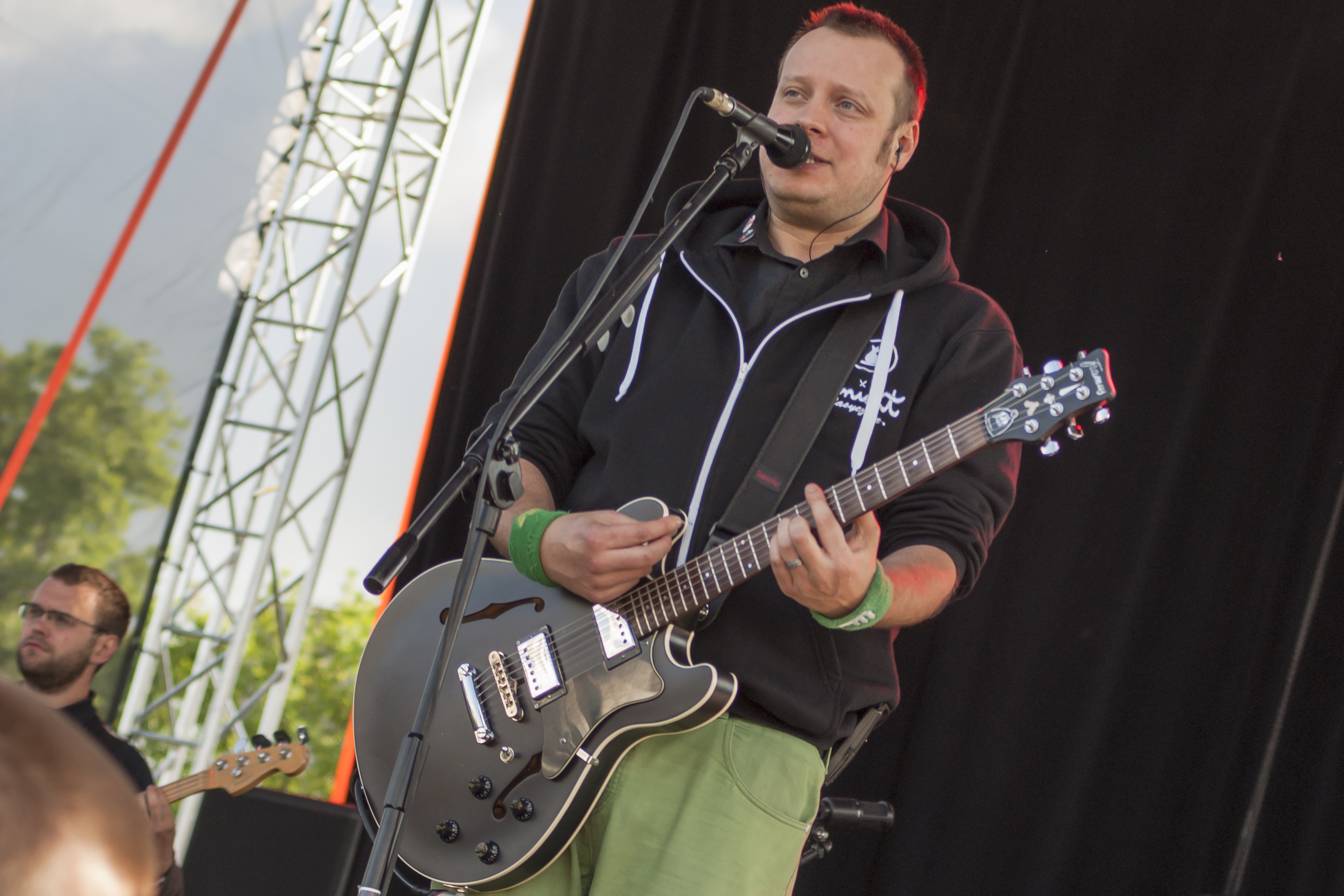 Jacek „Dżeki” Stęszewski z zespołu Koniec Świata na Festiwalu Ursynalia 2014